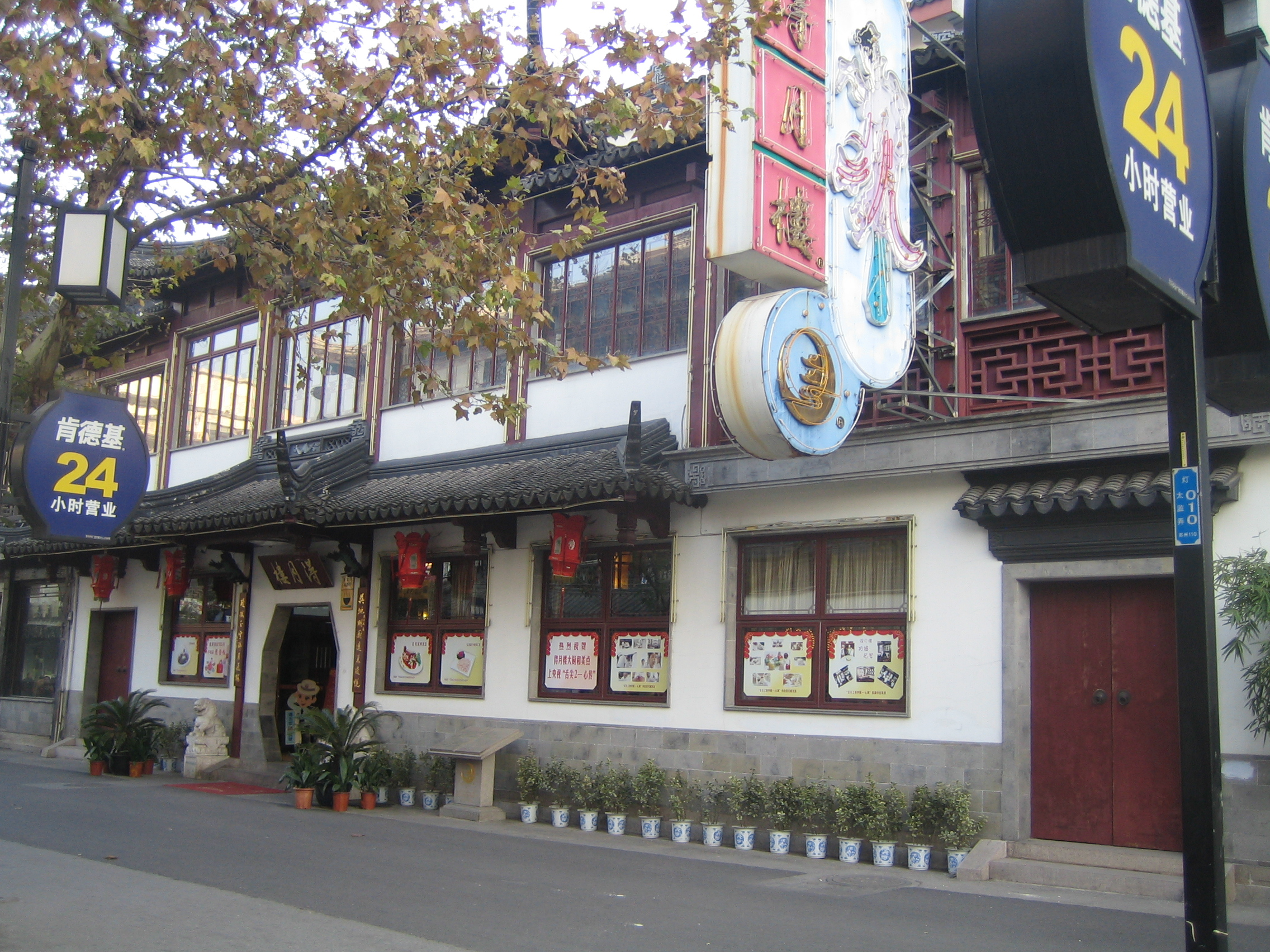 中文（中国大陆）: 苏州得月楼老楼，舌尖2就是在那里拍摄的。